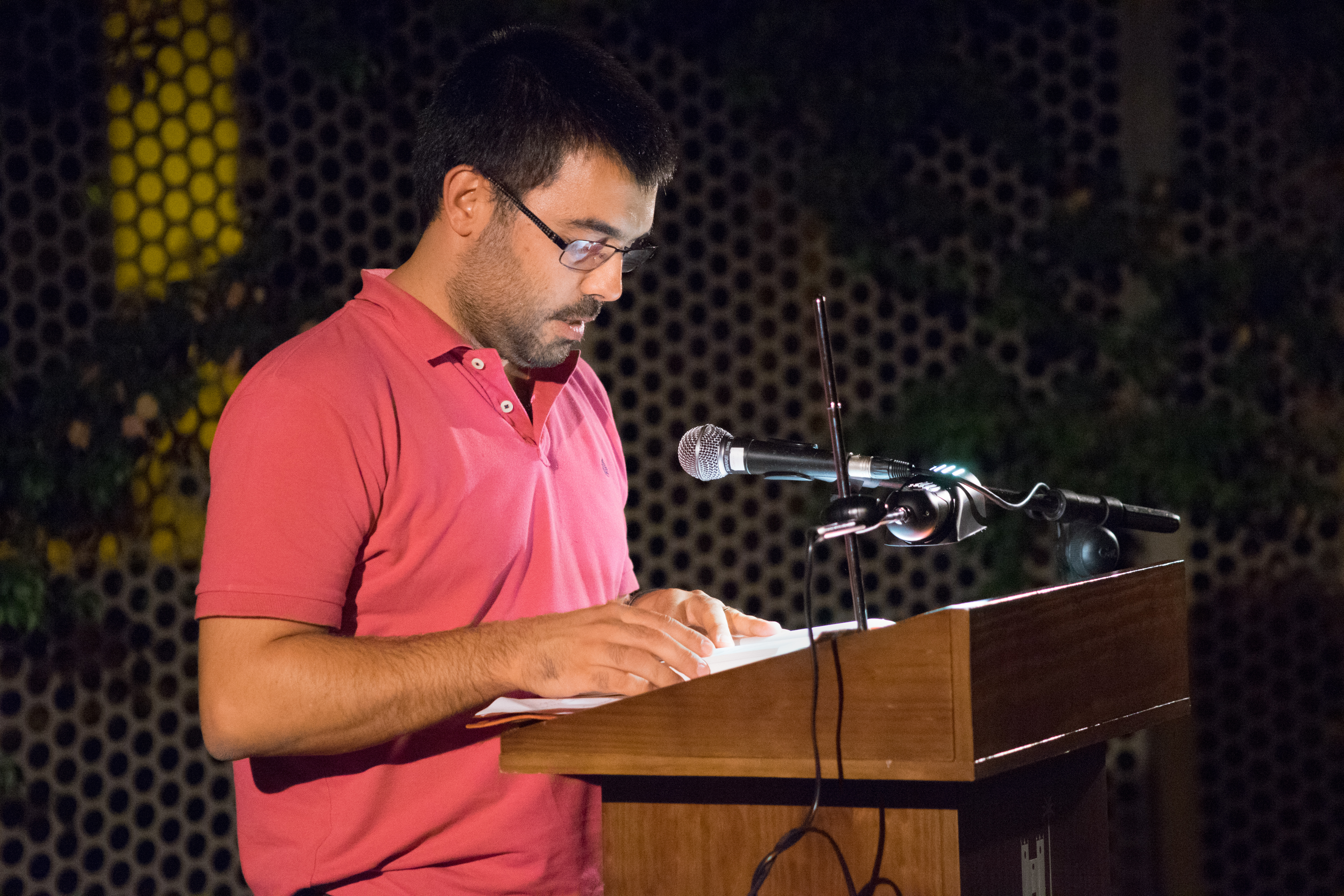 Natxo Vidal Guardiola, alcalde de la localidad alicantina de Monóvar desde Mayo 2015